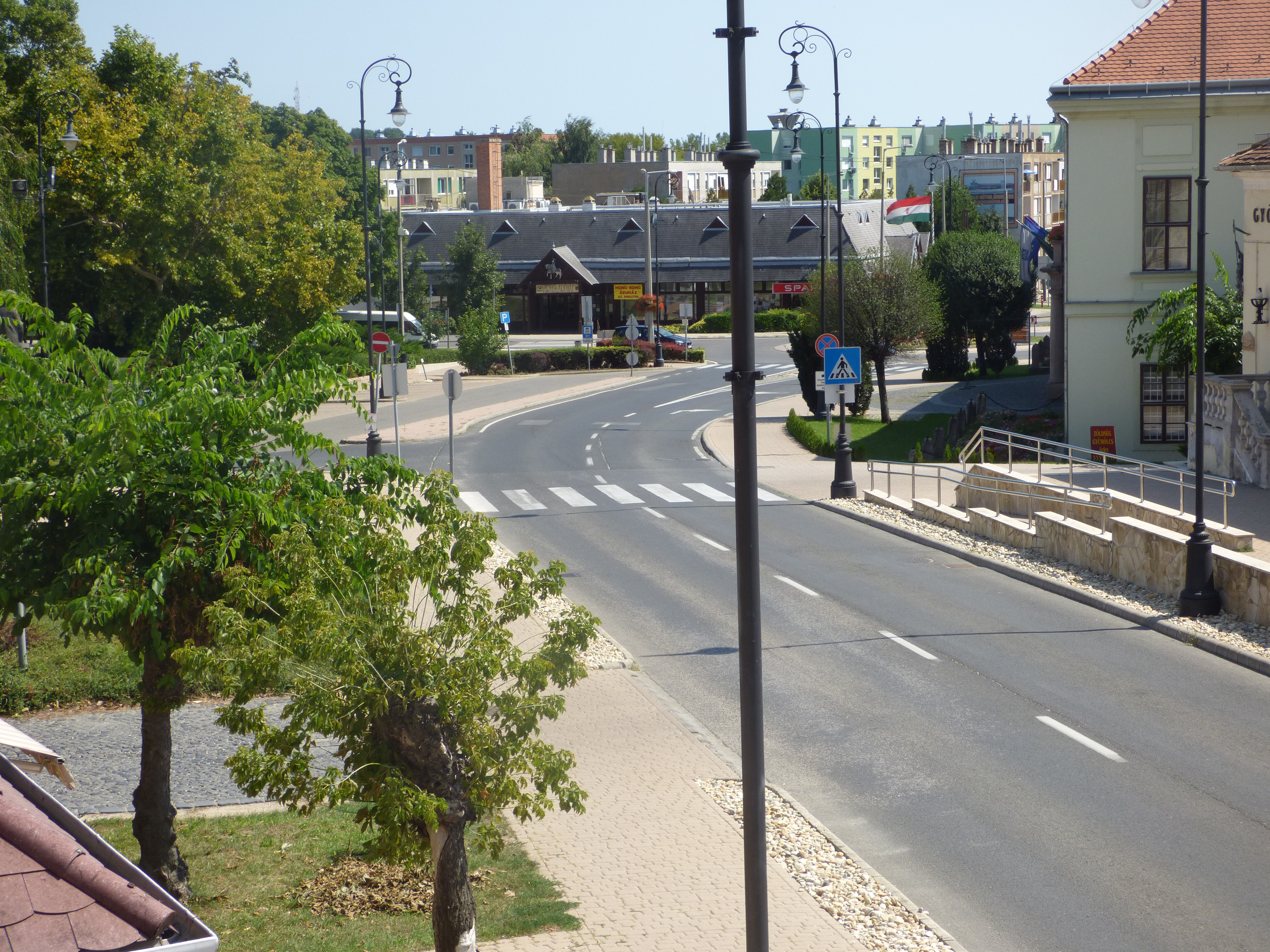 Mór belvárosa a Szent Kereszt-templomtól délnyugat felé nézve